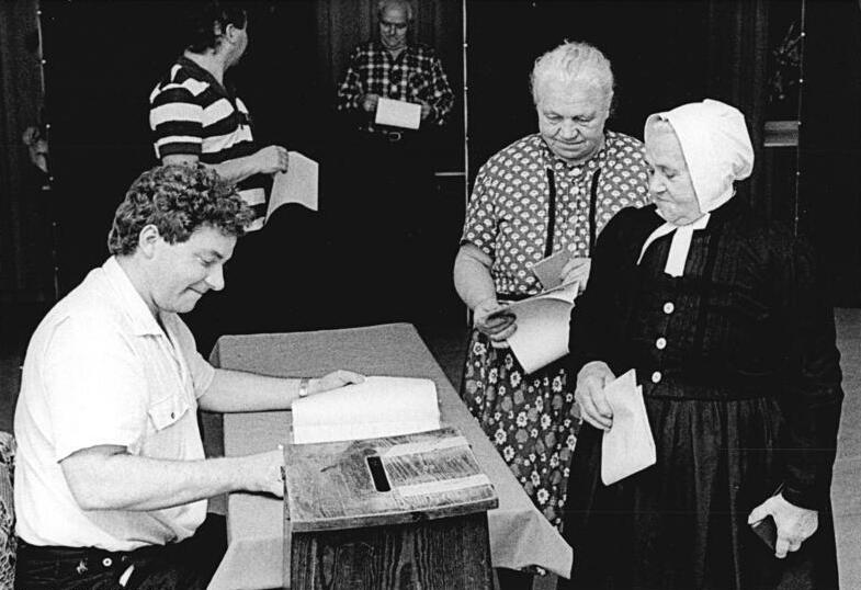 Landtagswahl, Sorben im Wahllokal ADN Rainer Weisfolg 14.10.90 Cottbus: Wahlen. Stimmabgabe. Die Sorben wählten zum Teil für Sachsen, zum Teil für Brandenburg. In Sachsen, zu dem der Kreis Weißwasser gehört, treten die Sorben im Gegensatz zum Land Brandenburg ohne eigene Liste an.